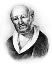 Ivan Koreisha